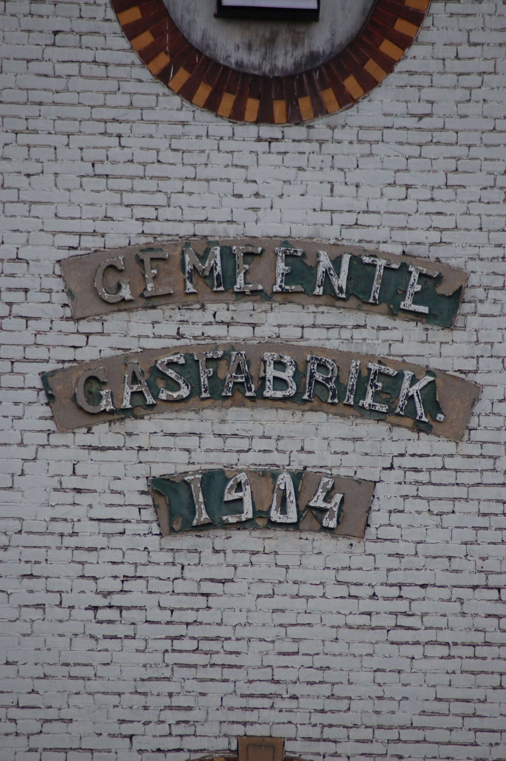 Detailshot van de gasfabriek in Ede